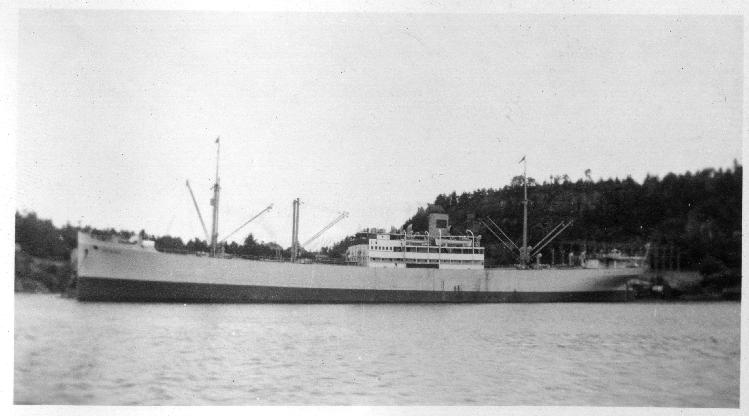 Bildet er hentet fra Arkivverket. Mowincel Bergen, 7835 T.DW. I engelsk tjeneste, v/Trosvik Arkivinstitusjon : Statsarkivet i Kongsberg Arkivnavn : Telemark politikammer Sted : , , , Trosvik Emneord: Skip, Båt, Hav Avbildet